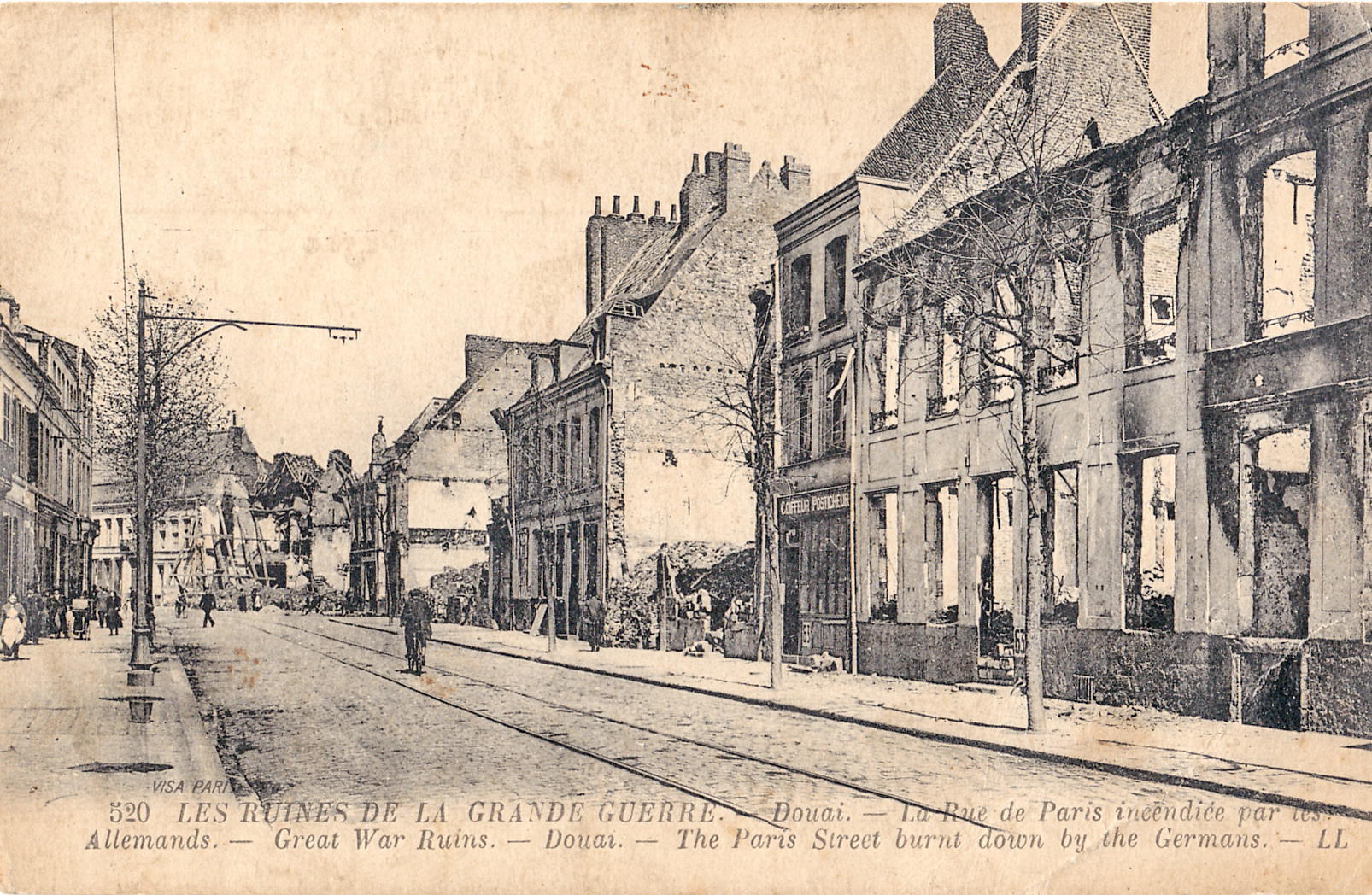 Carte postale ancienne éditée par LL, collectrion Les ruines de la Grande Guerre, n°520 :DOUAI - La Rue de Paris incendiée par les Allemands